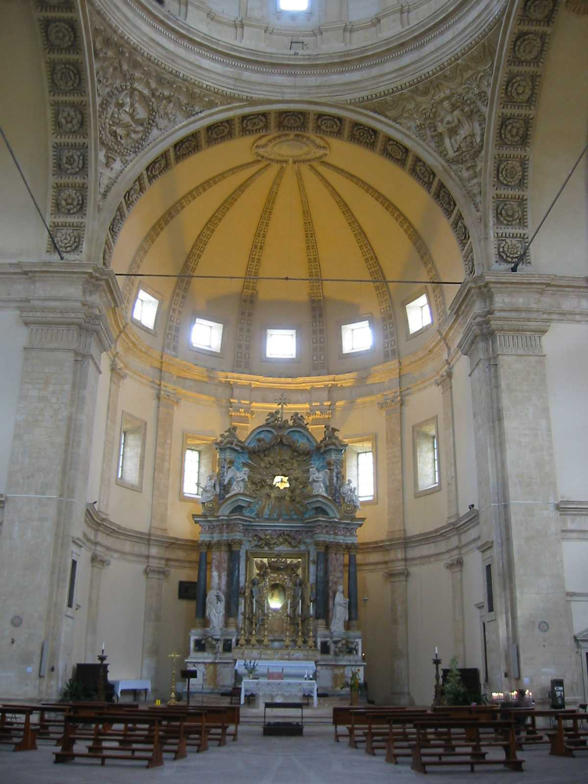 Todi